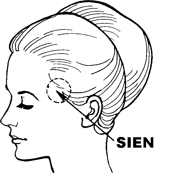 Dibujo mostrando la localización de la sien izquierda.